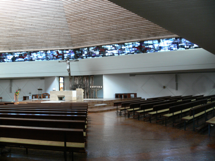 Pfarrkirche St. Columban, Friedrichshafen Pfarrkirche St. Columban, Friedrichshafen